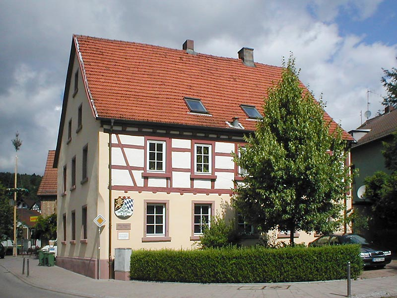 Altes Rathaus in Bammental, Rathaus 1851-1956